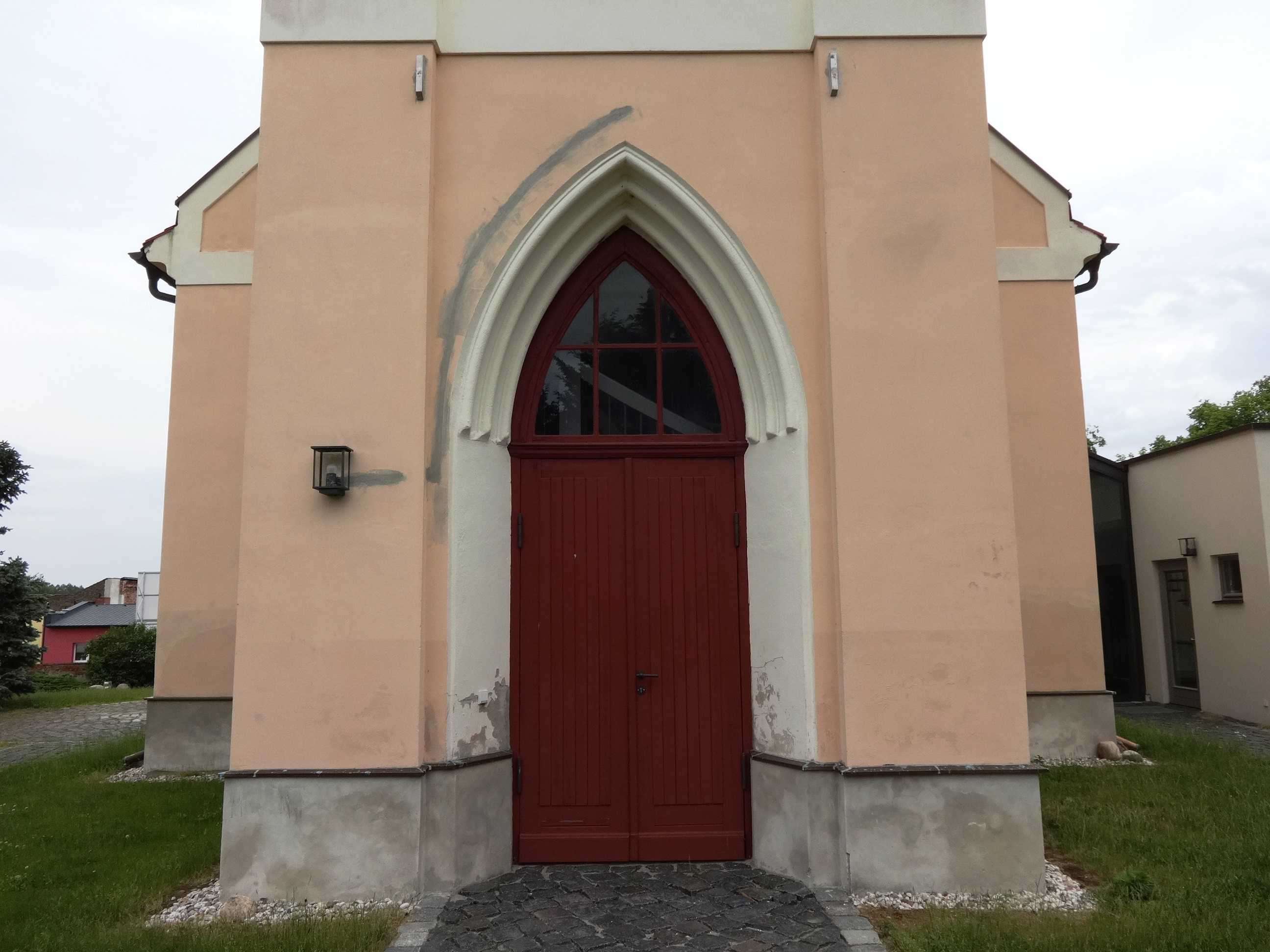 Die Dorfkirche Rieben wurde im Stil der romanischen Neugotik in den Jahren 1817 bis 1820 errichtet. Im Jahr 1896 erweitere die Kirchengemeinde die Saalkirche und schaffte eine Orgel an. Nachdem in den 1970er Jahren bei einer Sanierung ein Putz verwendet wurde, der das Bauwerk schädigte, sanierte die Gemeinde den Sakralbau in den Jahren 2006 bis 2012. Das Sanierungskonzept sah dabei sowohl eine kirchliche, wie auch kommunale und soziale Nutzung vor.